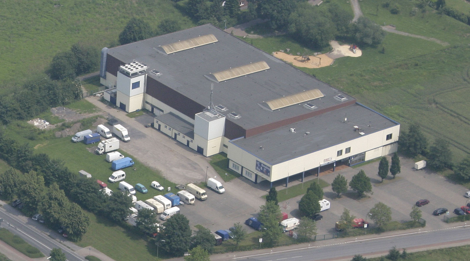 Die Maximilian Eissporthalle ist das Eissport- und Bowlingcenter der Stadt Hamm in Nordrhein-Westfalen.